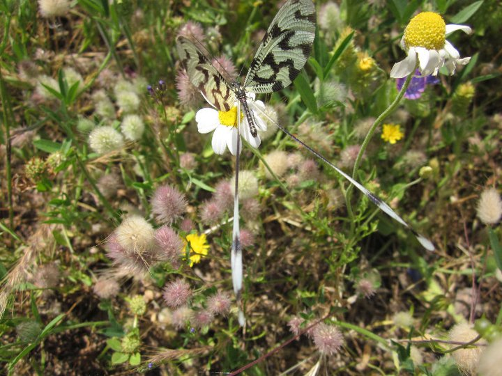 Netzflügler (Neuroptera, früher Planipennia), ein sog. Fadenhaft (Nemopteridae). Welcher genau, hm, Nemoptera sinuata womöglich, Fundort:Ayvalik/Türkei/Steinbruch am Meer